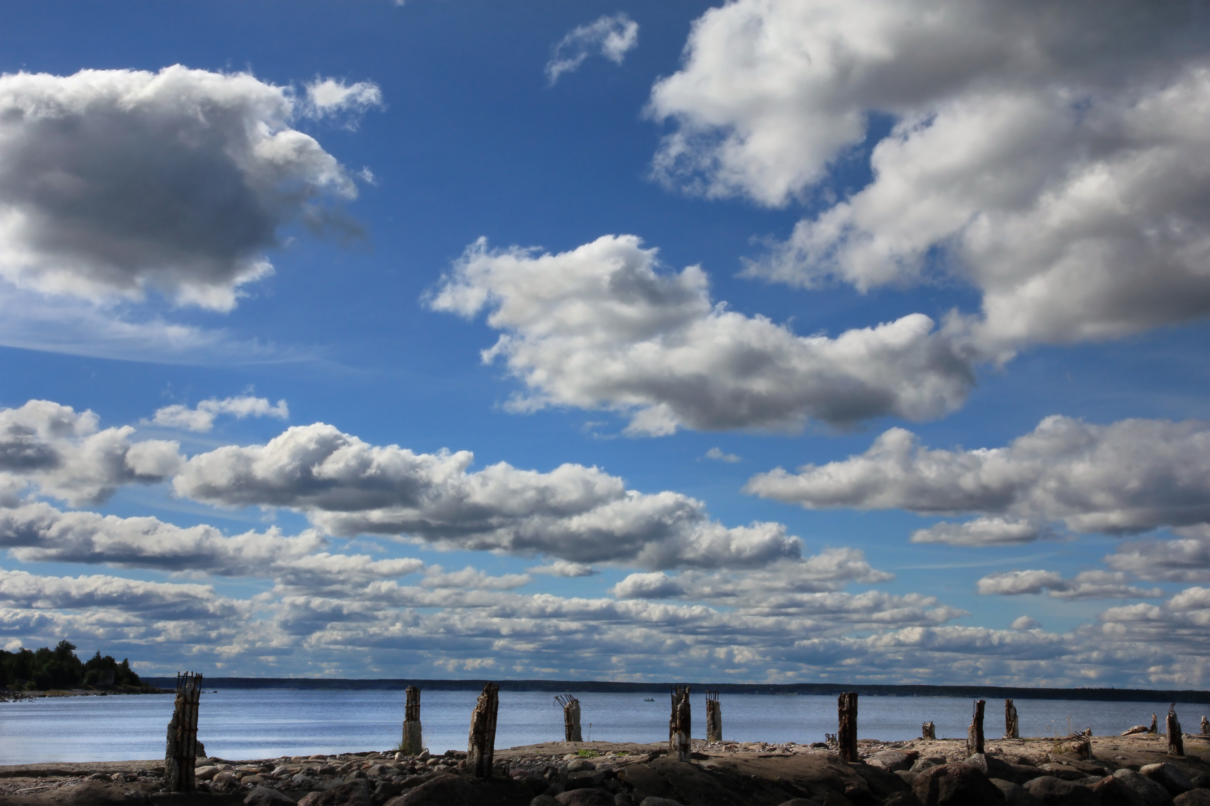 Sadamakai Hara lahes